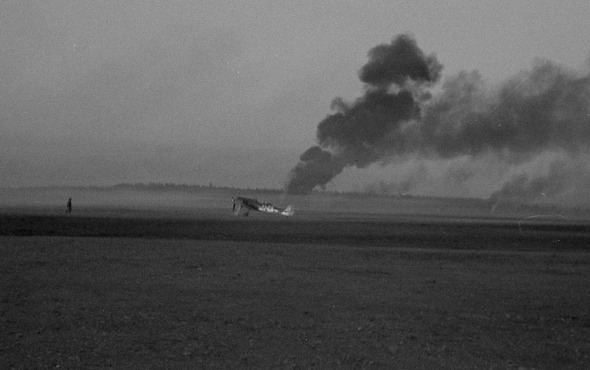 Palava saksalainen lentokone Immolan kentällä. Immola 1944.07.02